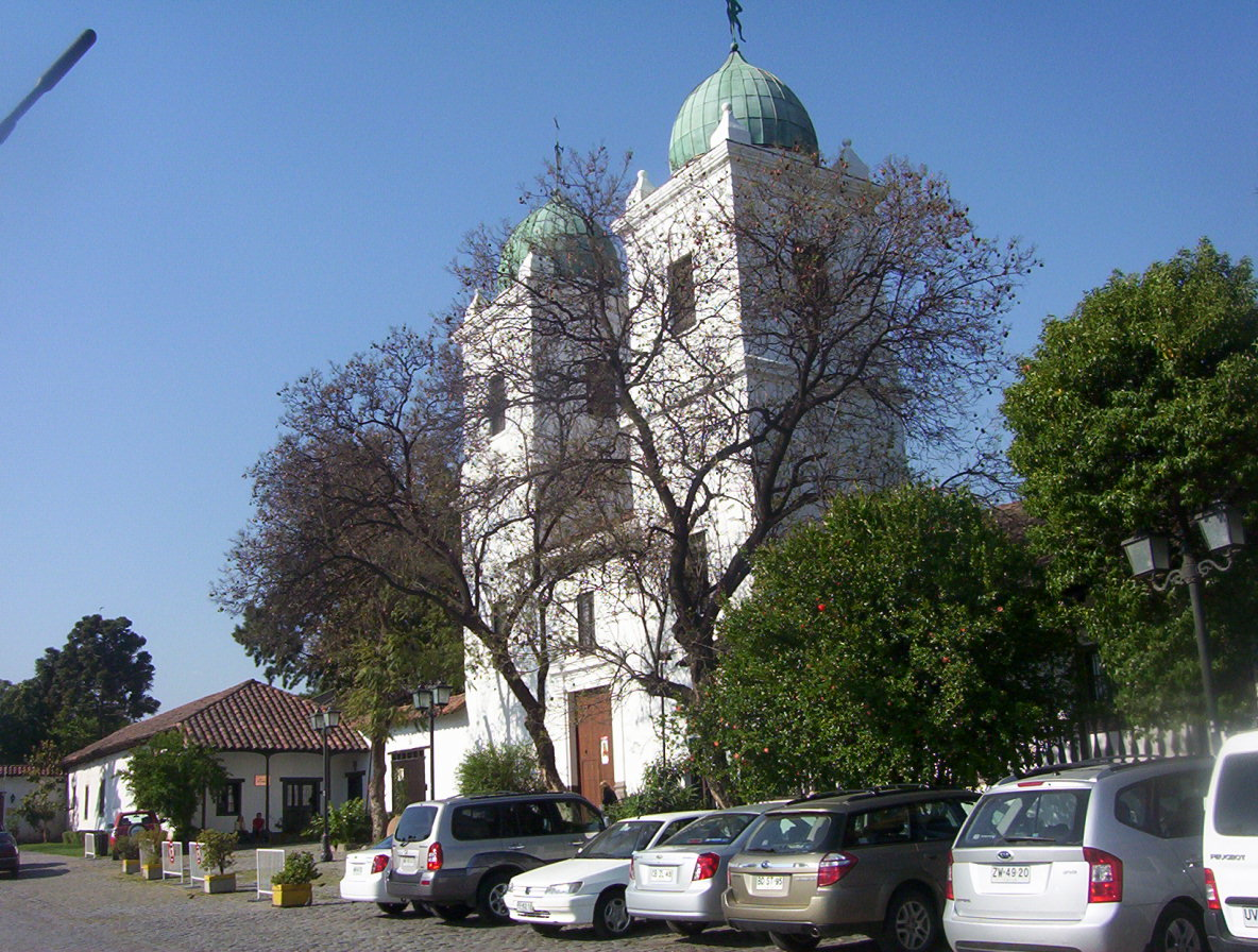 Iglesia San Vicente de Ferrer en Apoquindo Santiago de Chile